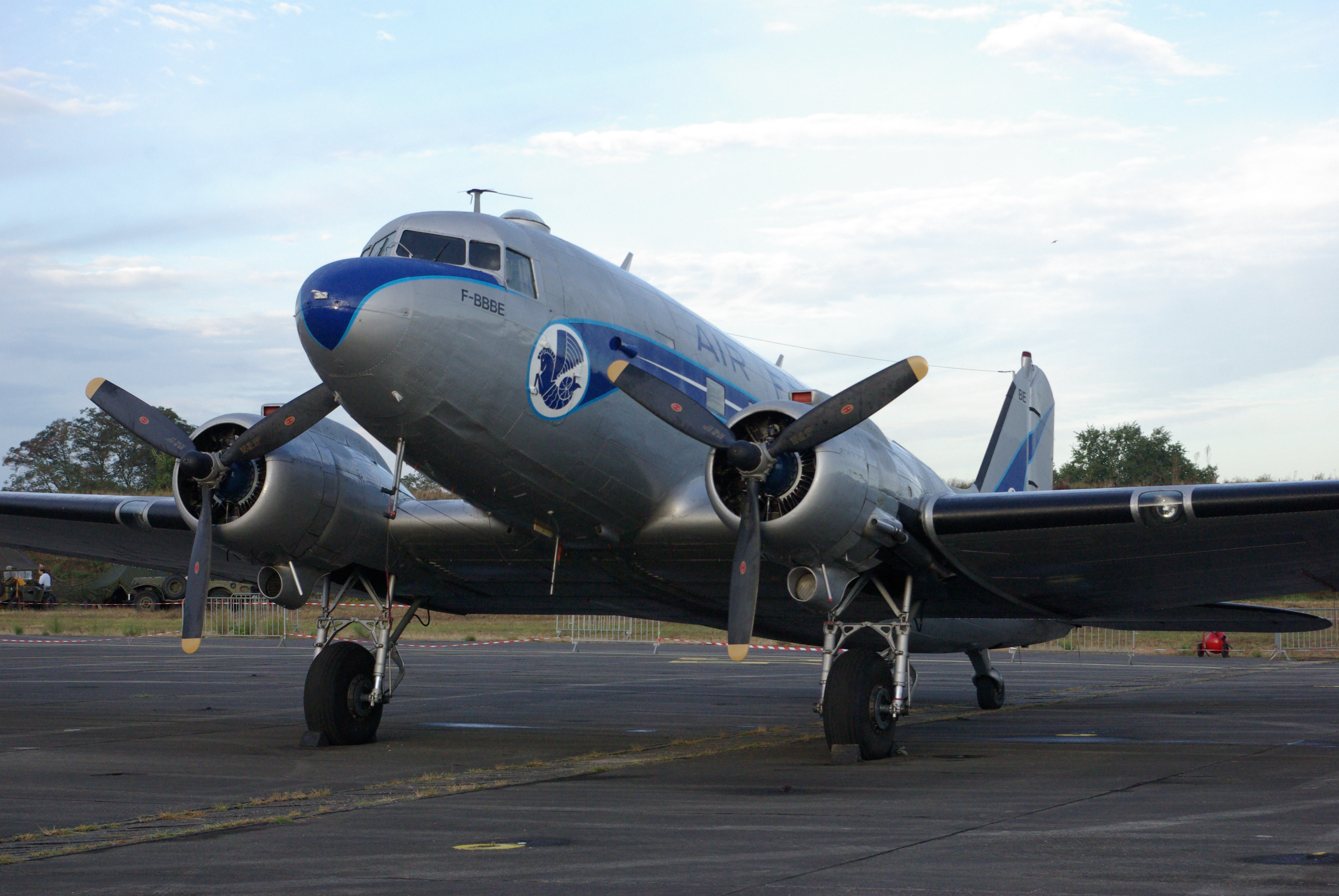 DC-3 Air France F-BBBE au meeting Des Étoiles et des Ailes 2014 à Toulouse-Francazal.